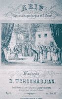 Афиша оперетты «Ариф» Тиграна Чухаджяна (1837-1898)